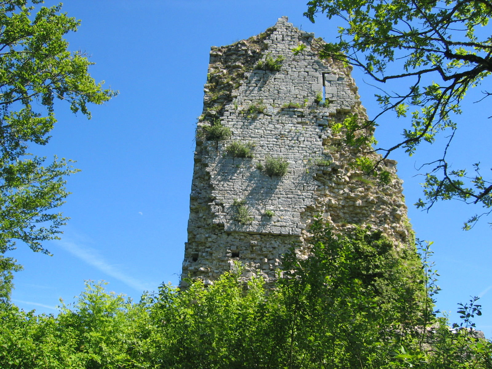 Ruines du Chateau de dramelay